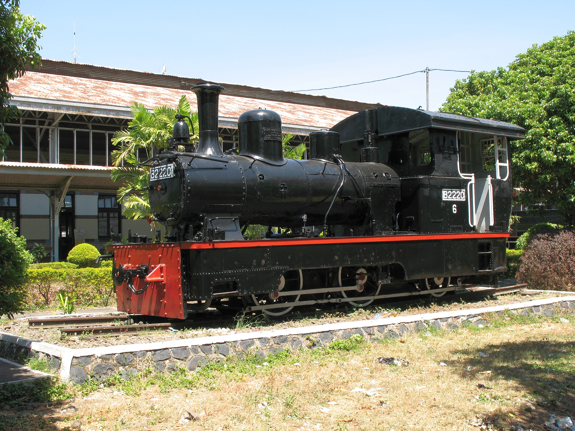 DKA B22 (B 22 20 C)